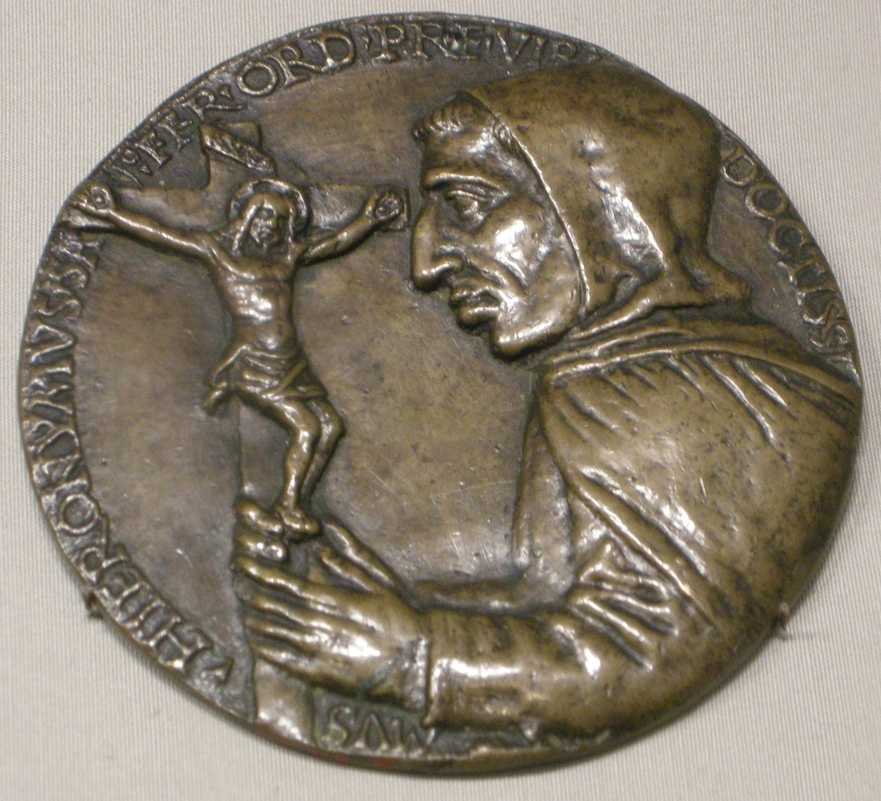 Medaglia di Girolamo Savonarola (1452-1498), 1492-94 ca.